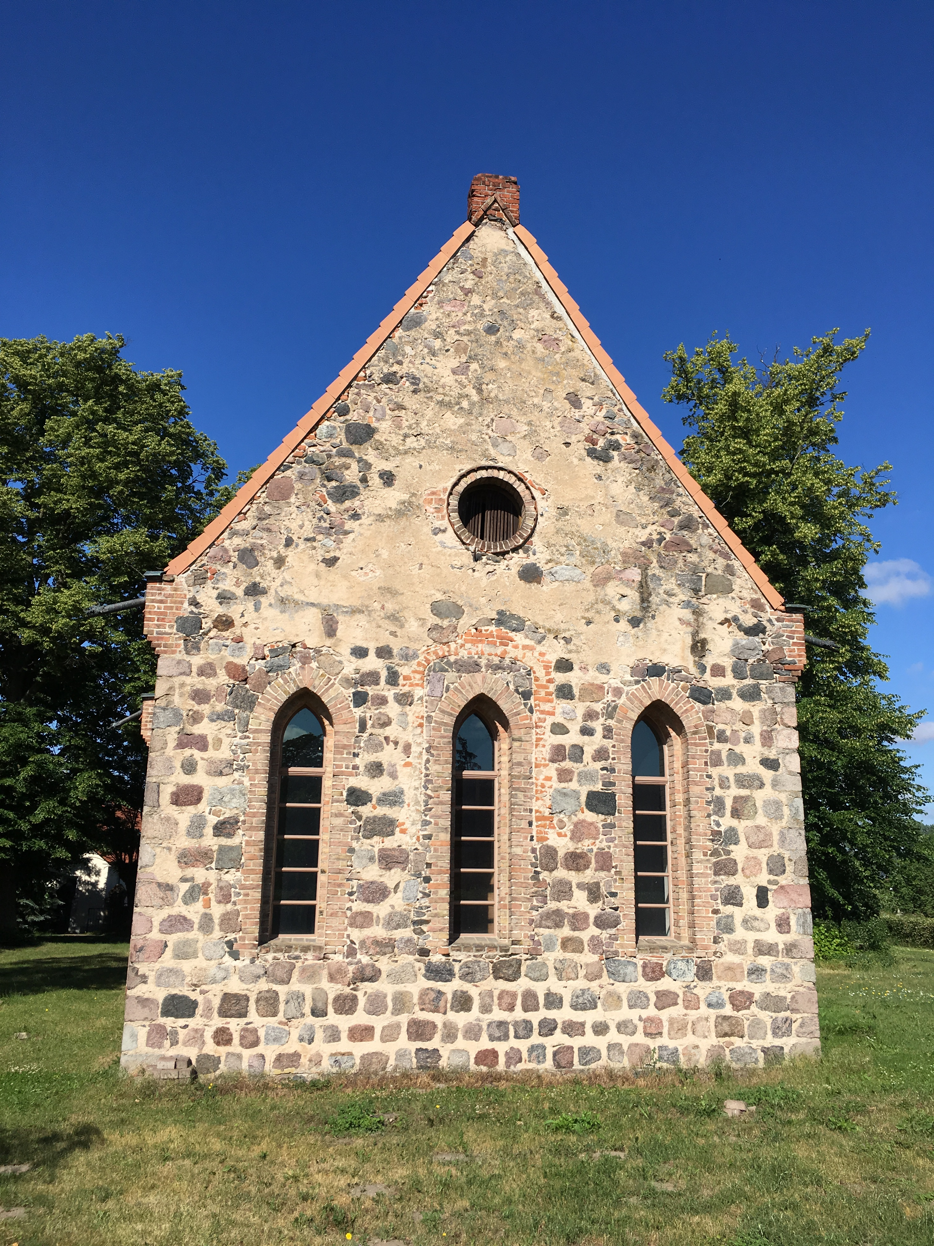 Die Dorfkirche in Brusendorf, Stadt Mittenwalde, entstand Anfang des 14. Jahrhunderts aus Feldsteinen. 1871 ließ die Kirchengemeinde die Fenster vergrößert und riss den Kirchturm ab. Im Innern ist ein Altarretabel mit zwei gotischen Schnitzfiguren.